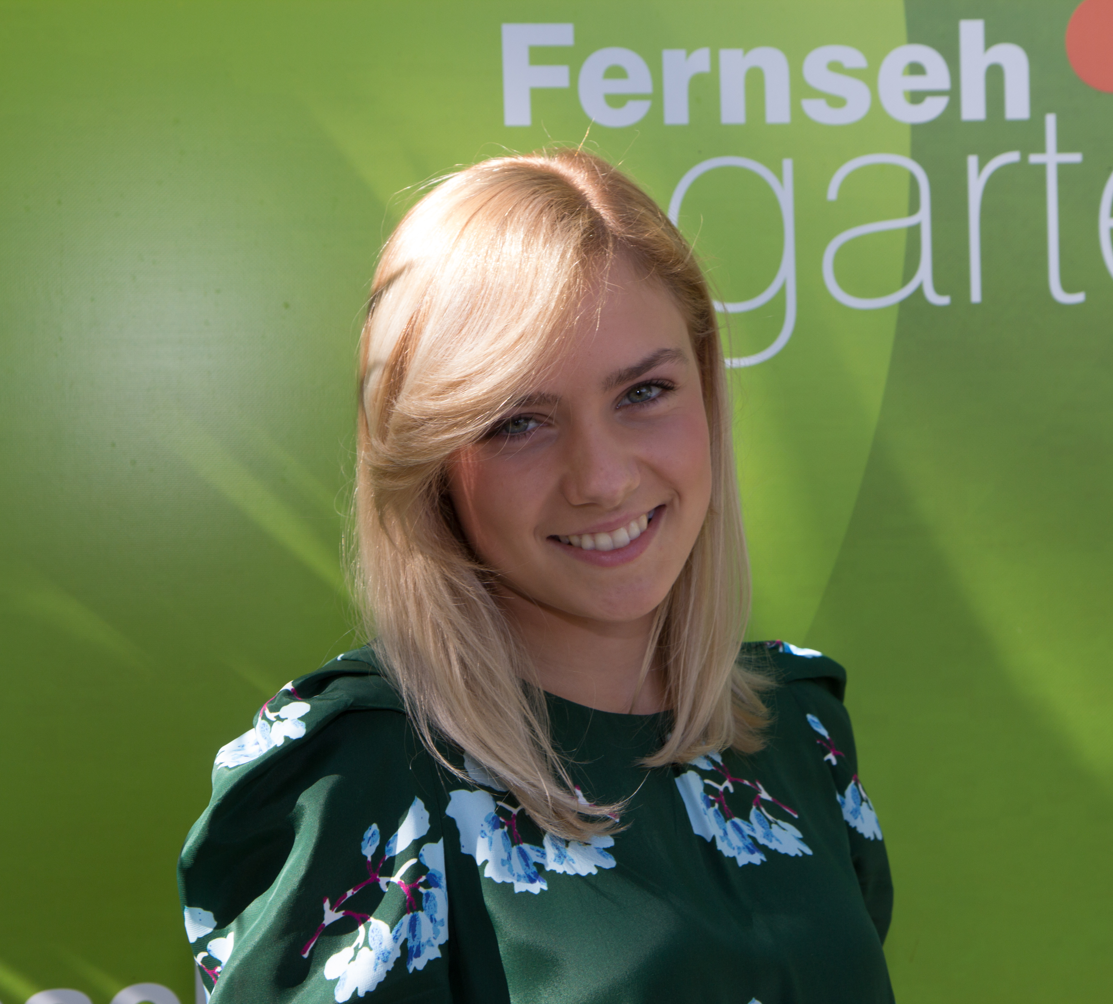 Marie Wegener als Gast im ZDF-Fernsehgarten am 16. September 2018 in Mainz.